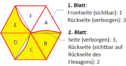 Blätter am Trihexaflexagon, und die verborgenen und sichtbaren, verschieden durchnummerierten Seiten; die gelb markierten Blätter stellen die sichtbare Rückseite dar